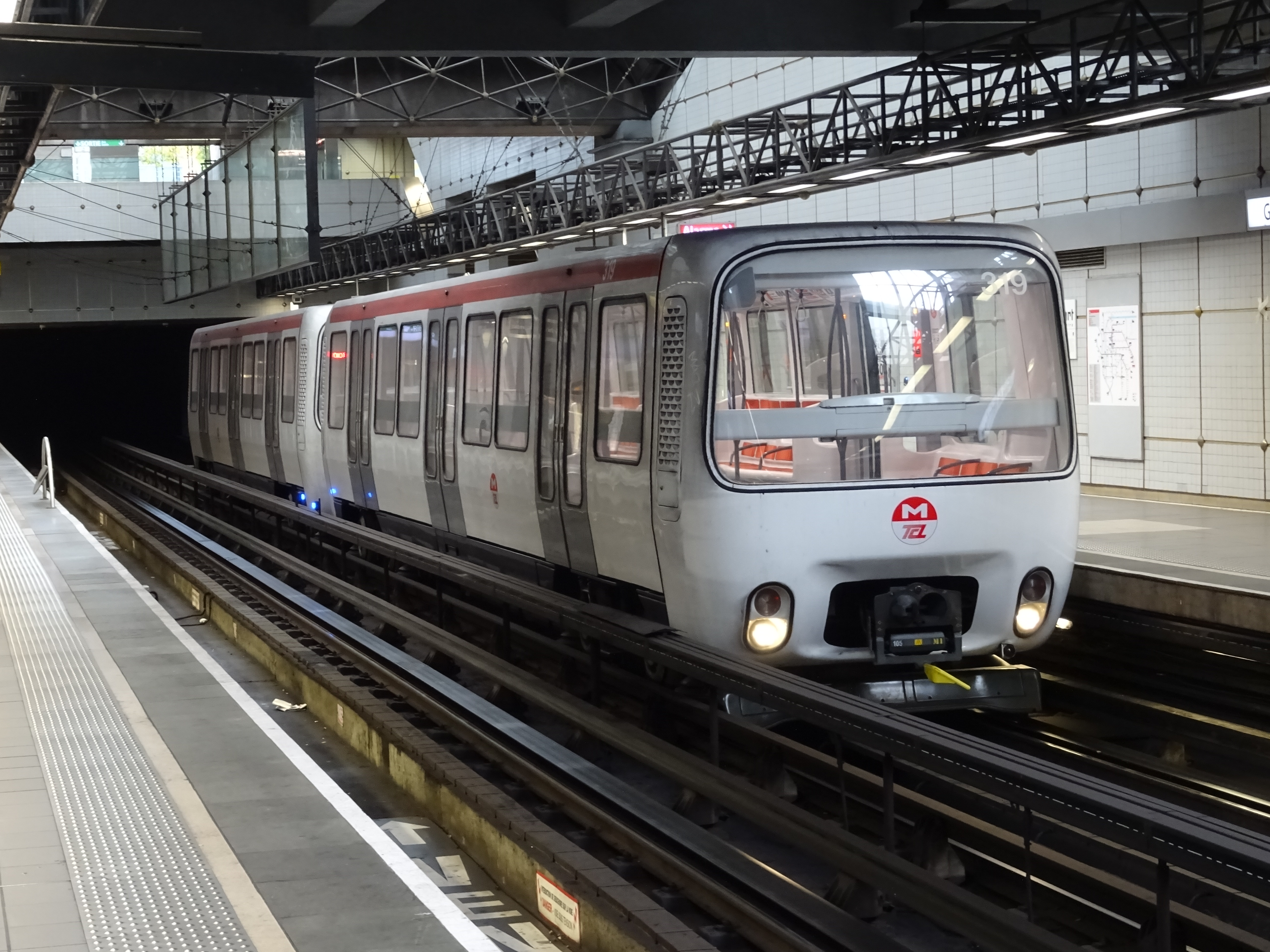 MPL85 à quai au terminus Gare de Vénissieux